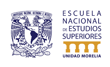 ENESUM